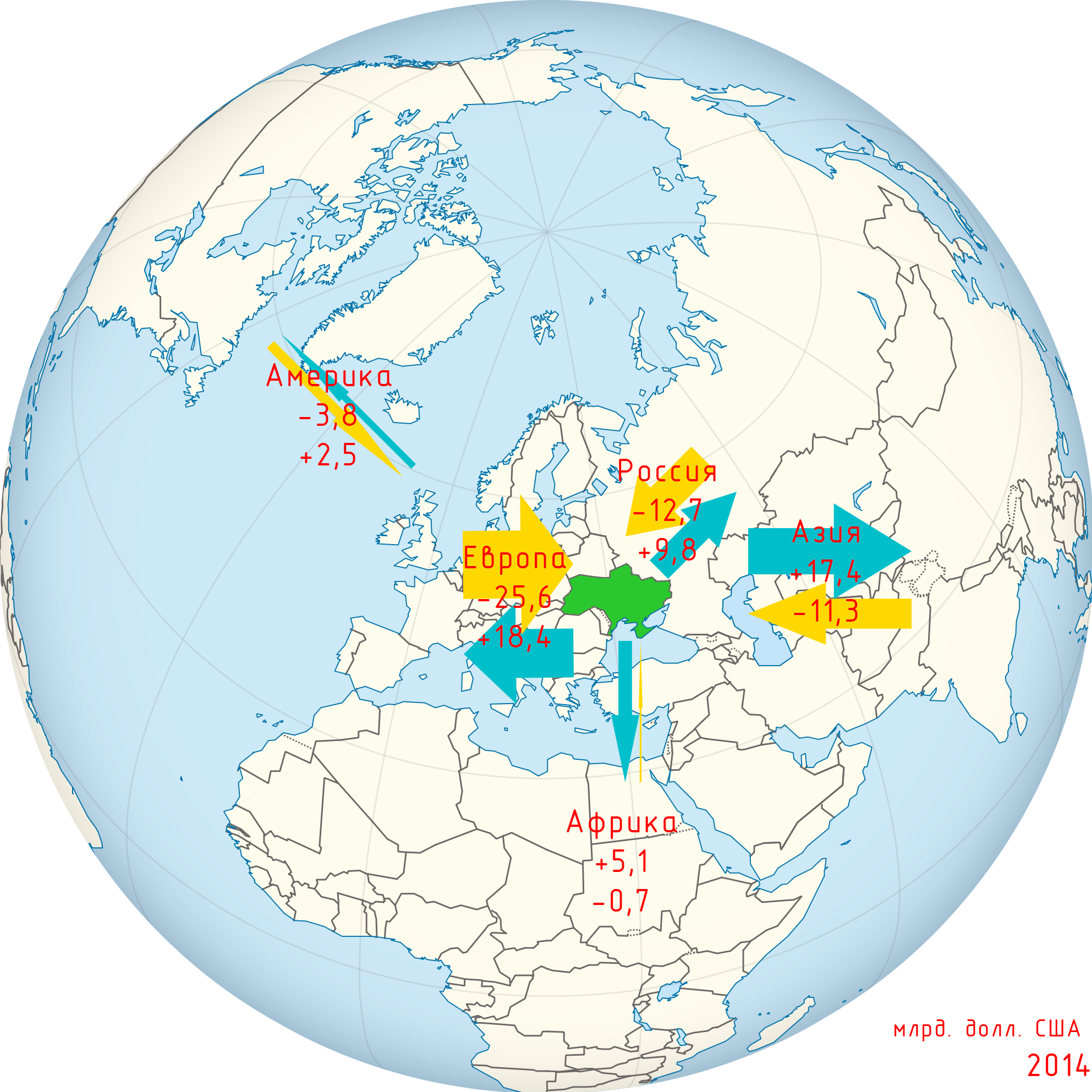 источник